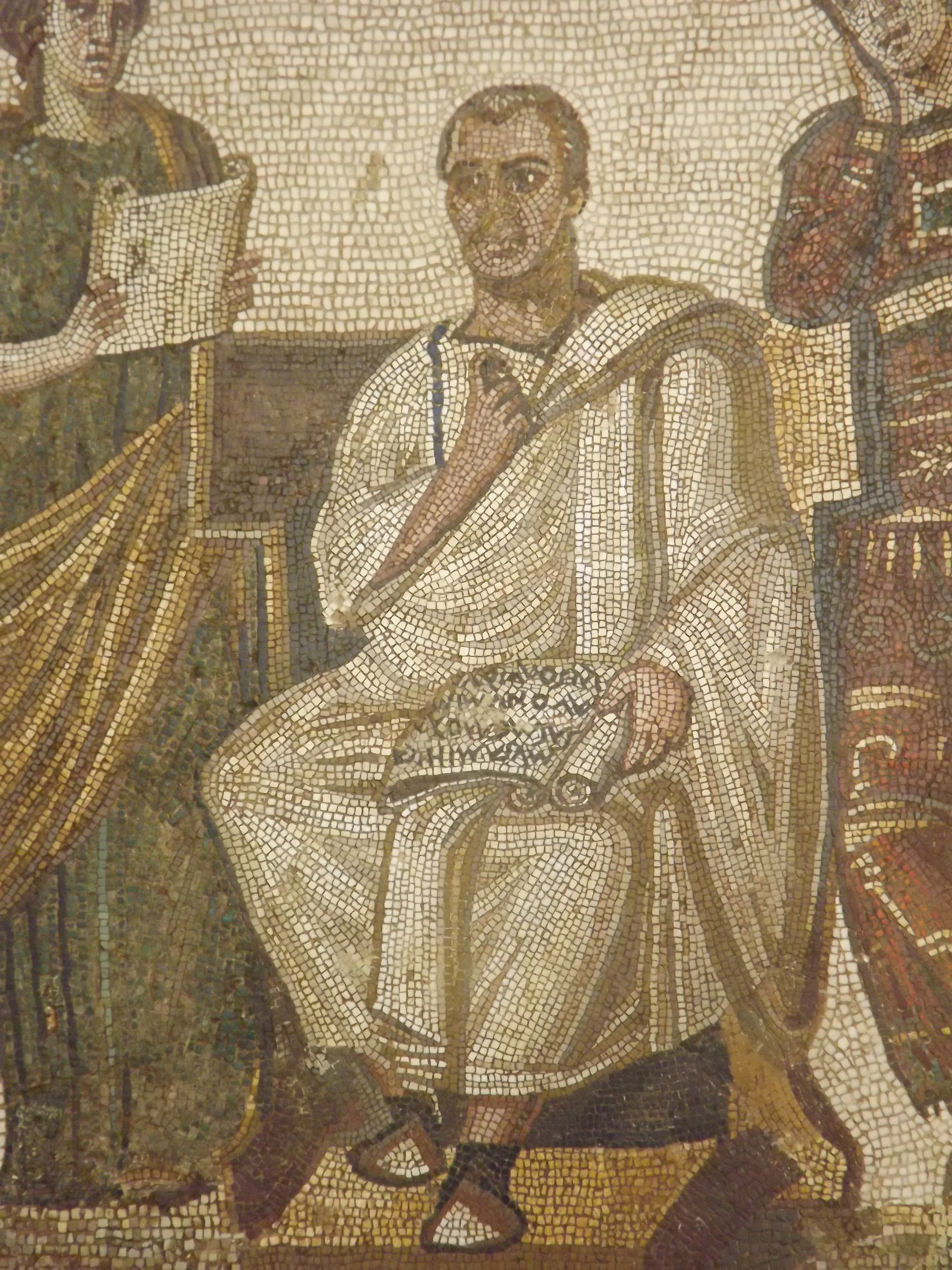 Virgile et les Muses au Bardo (Tunis)